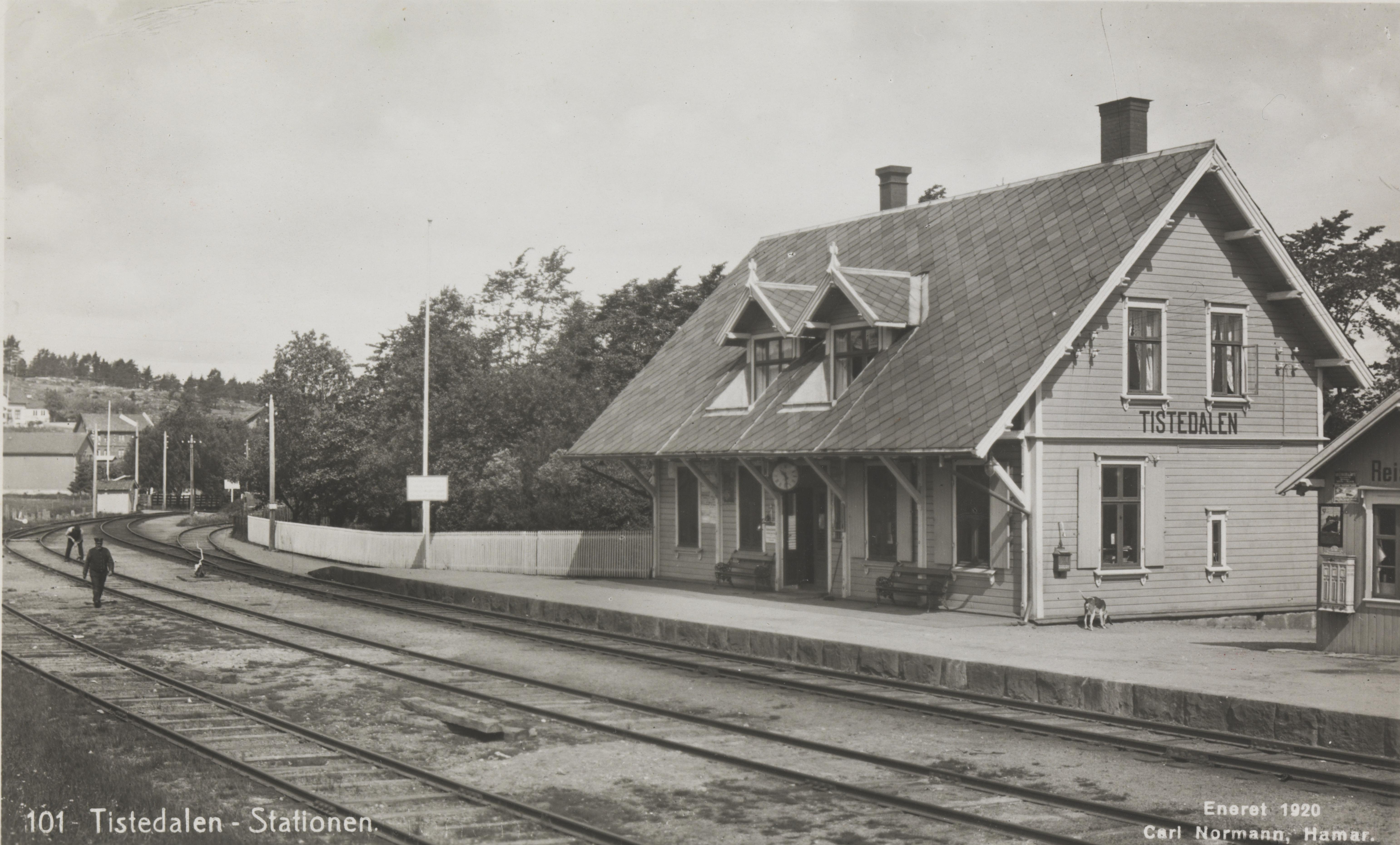 Bildet er hentet fra Nasjonalbibliotekets bildesamling Tistedal, Halden, Østfold